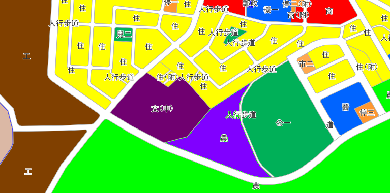 新屋高中擴大校地位置圖